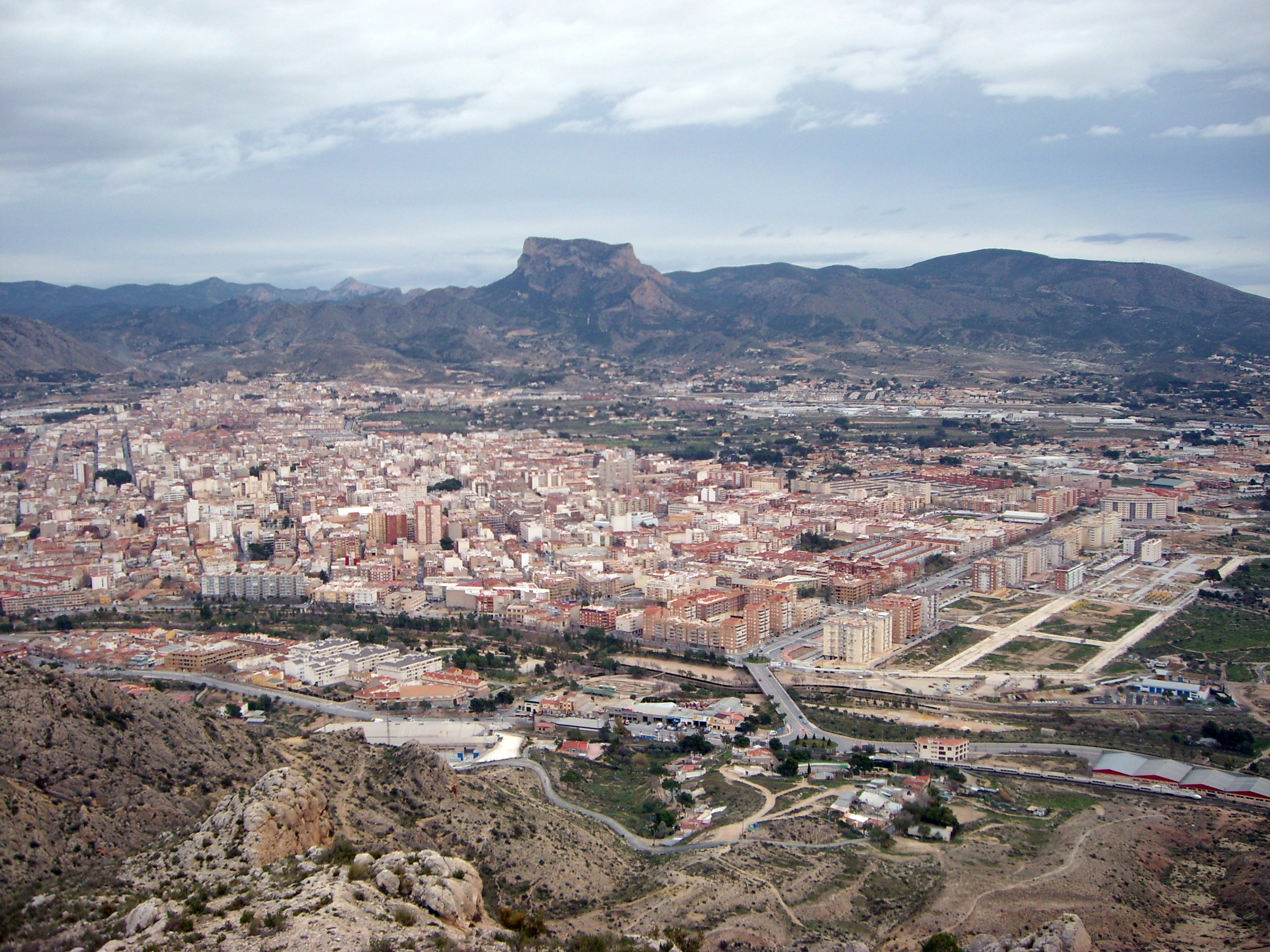 Elda-Petrel desde el monte Bolon